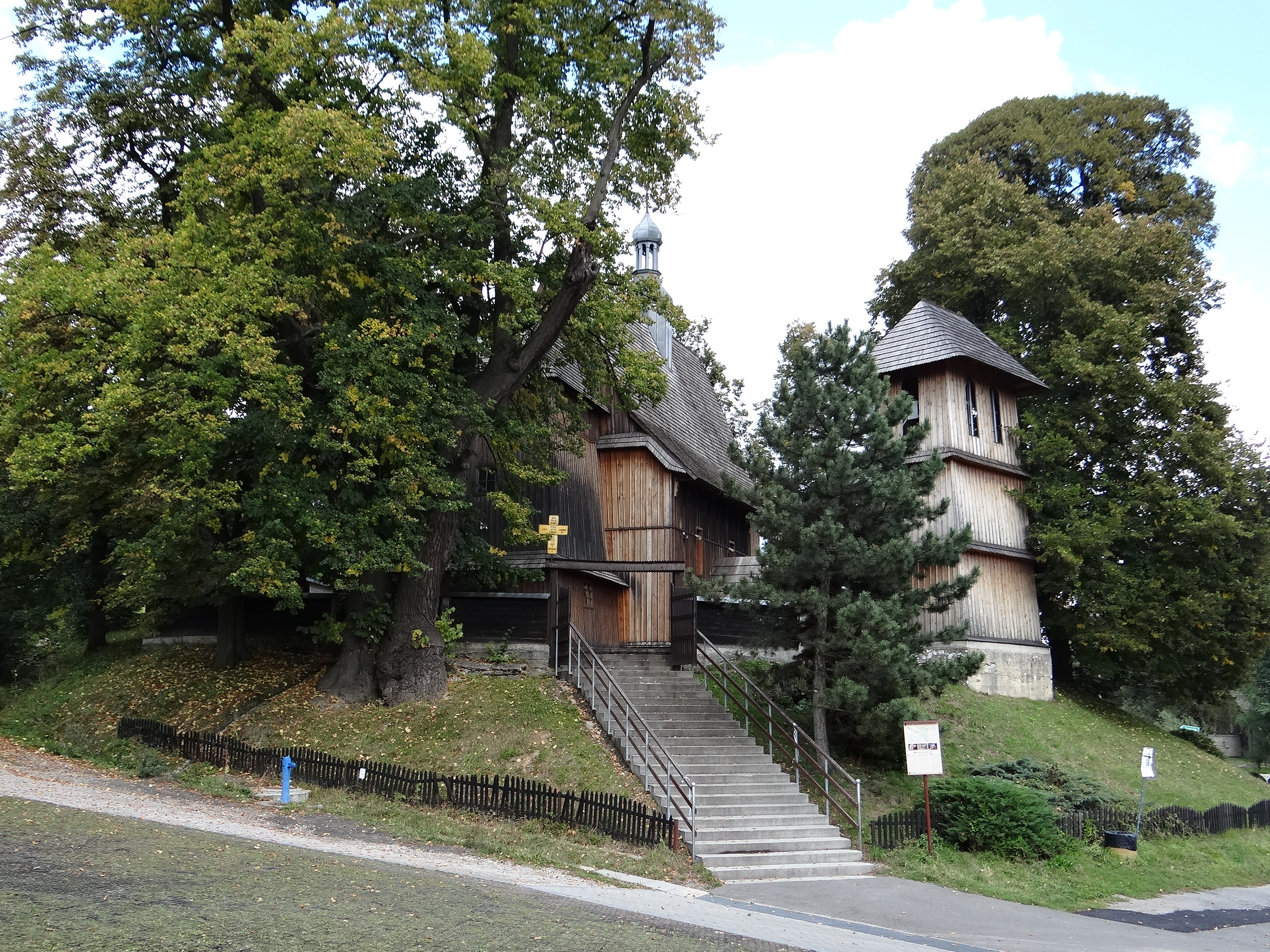 Racławice, kościół par. pw. Narodzenia NMP, 1511